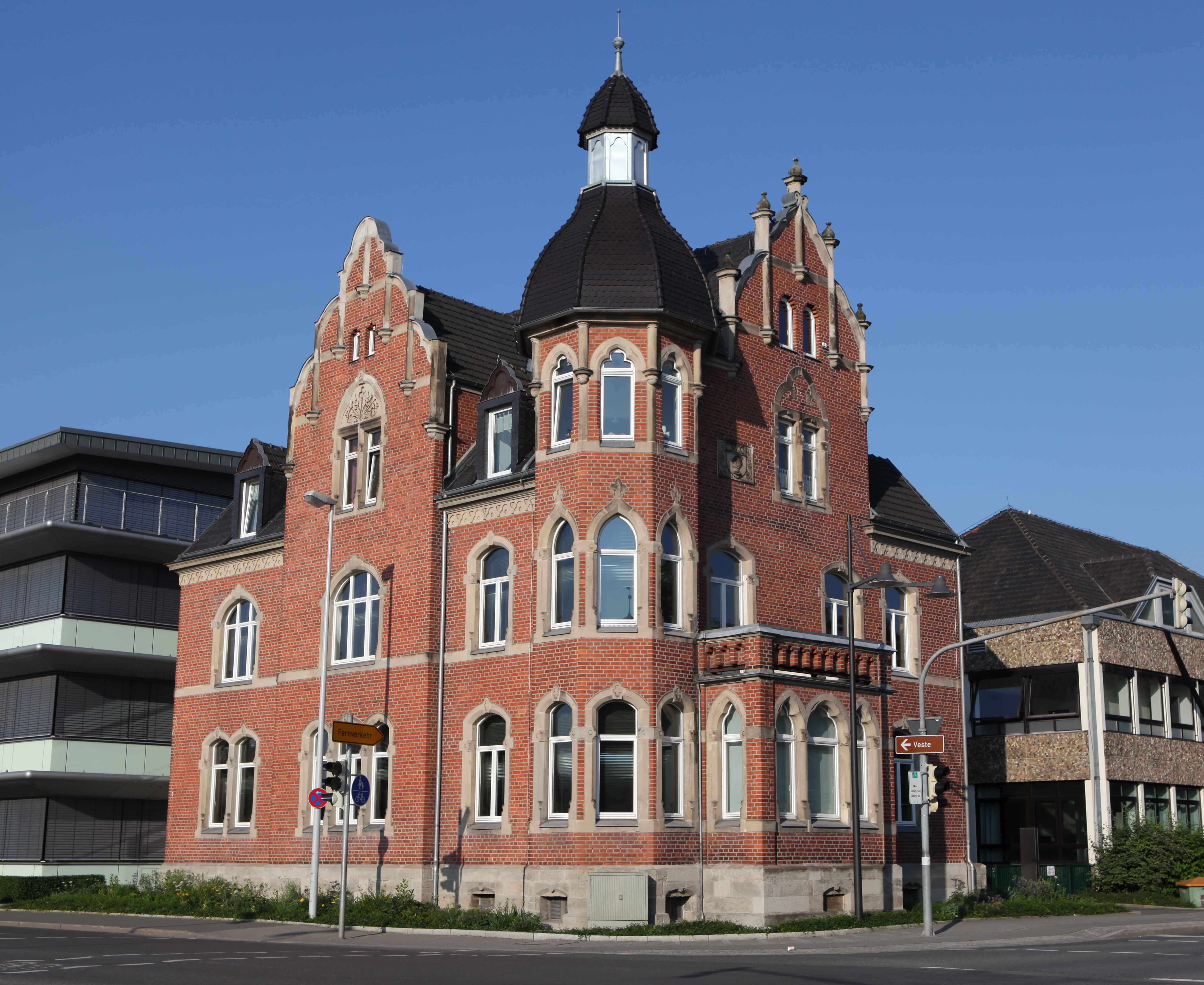 Bamberger Straße 2 in Coburg